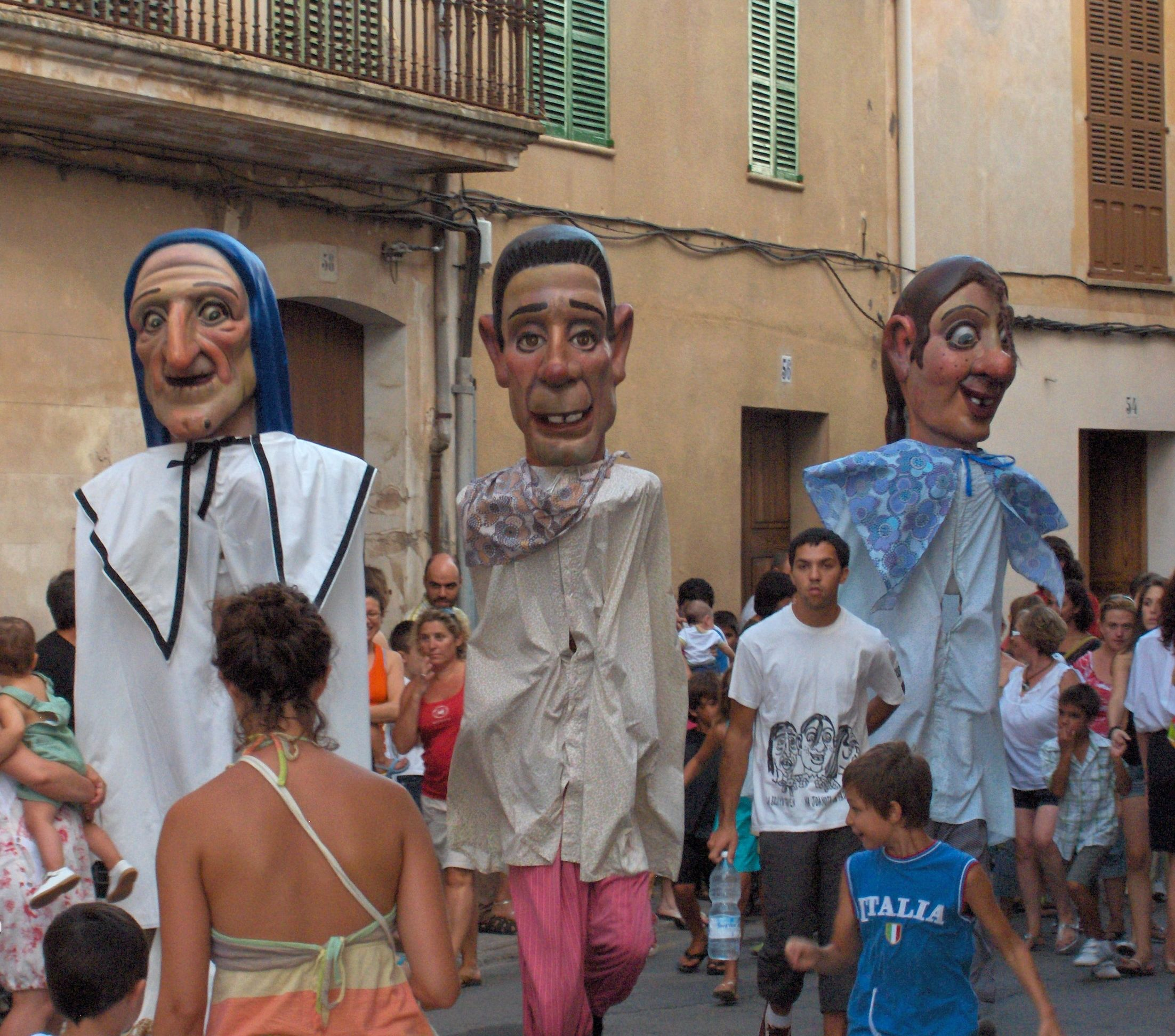 Tres dels sis gegants de Llucmajor. D'esquerra a dreta: La fada Morgana, l'amo de son Amoixa, na Joanota.